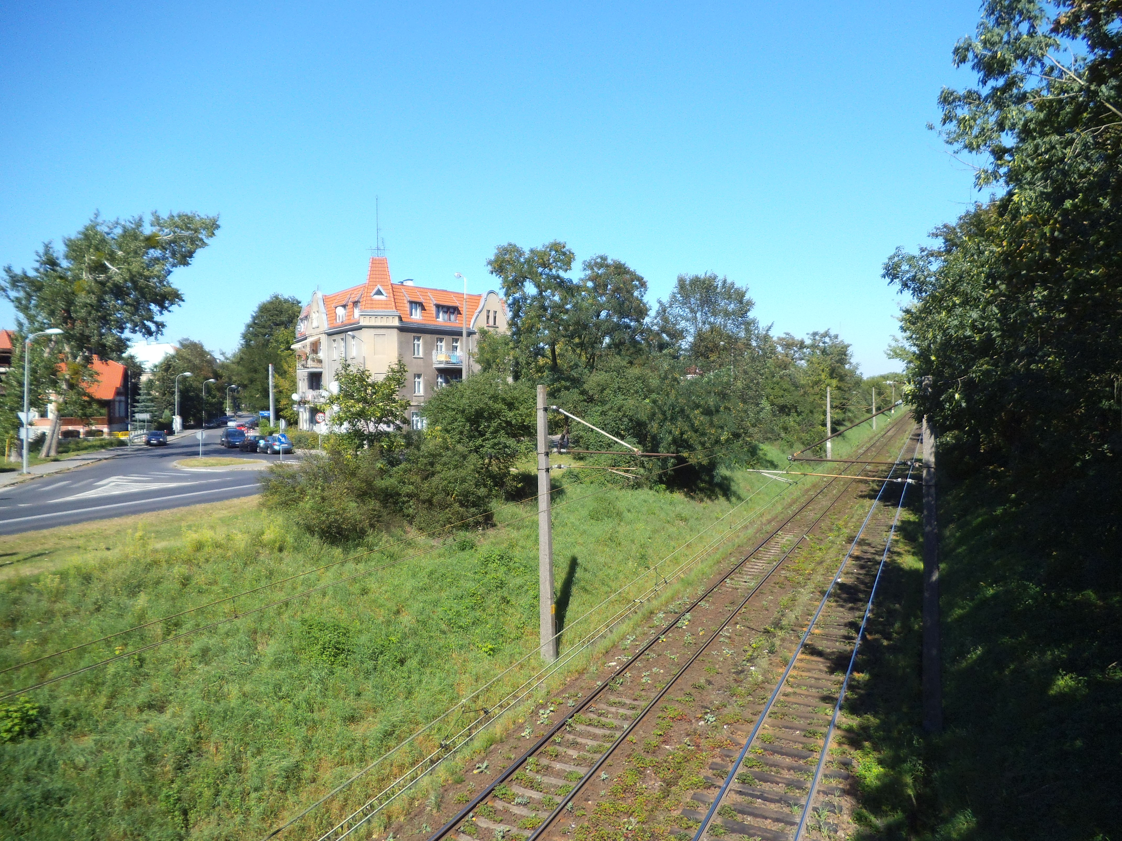 Linia kolejowa nr 353 w Toruniu44